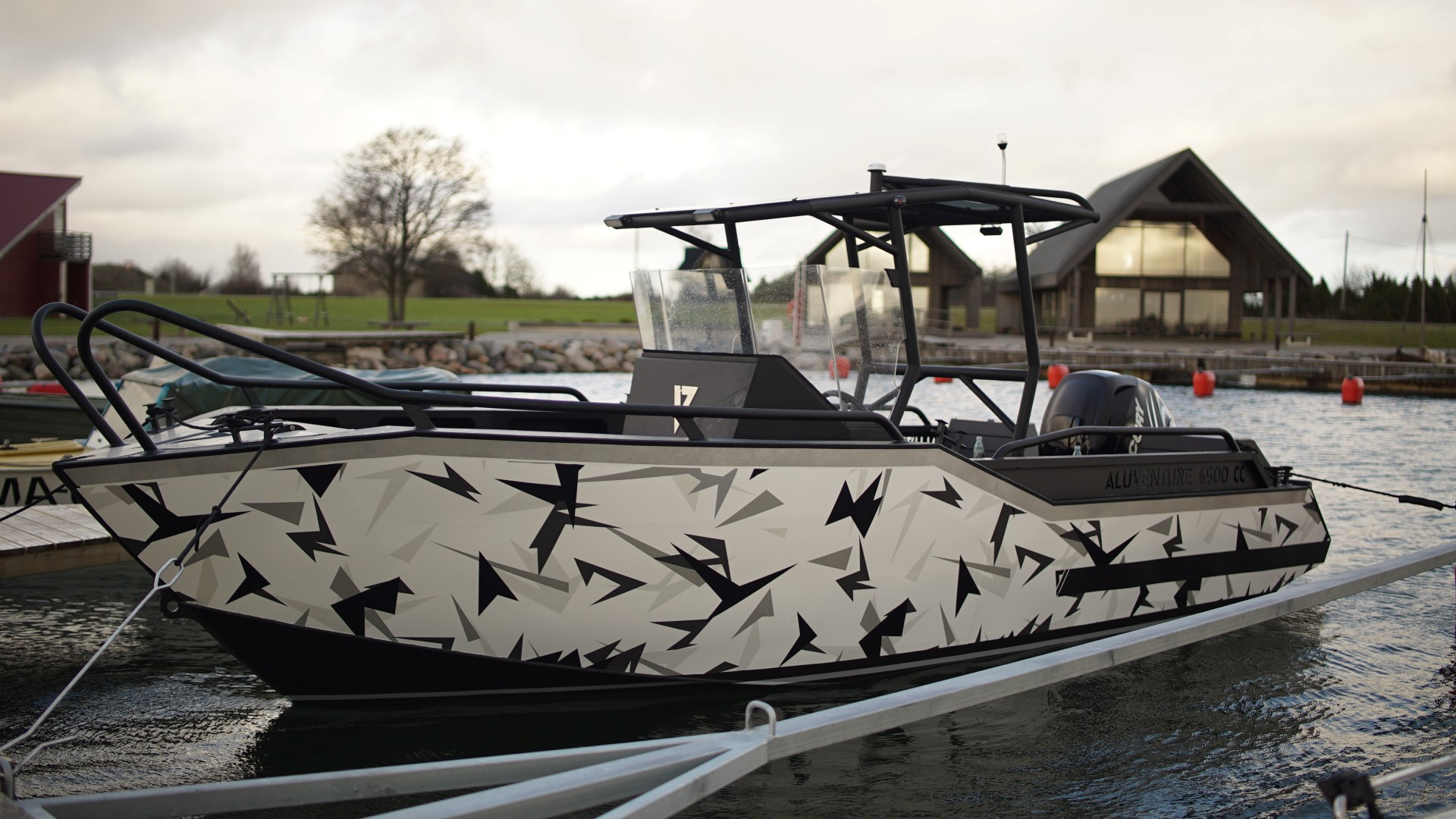 AluVenture båtmodell 6500 CC